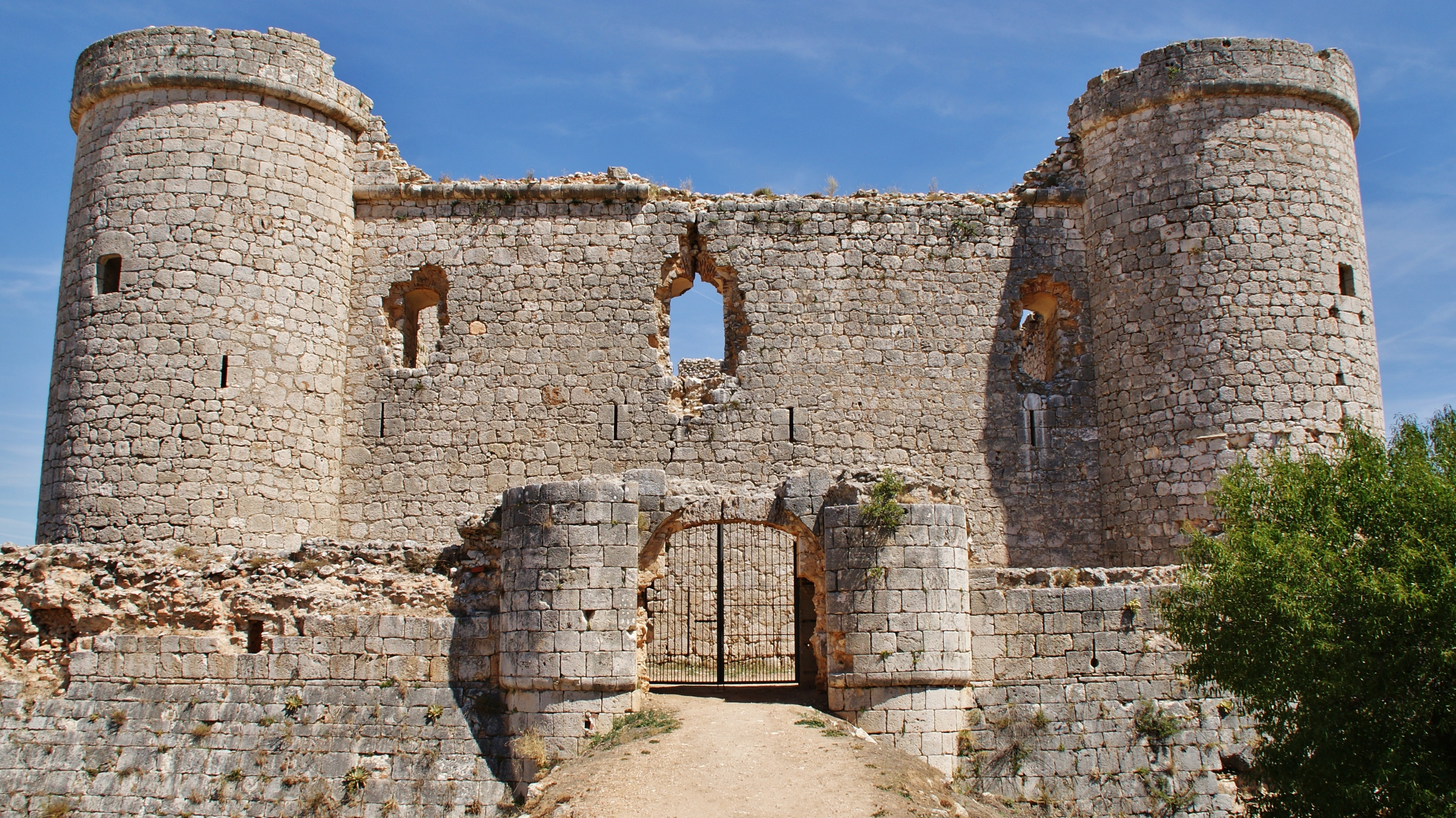 Fortaleza palacio de finales del siglo XV